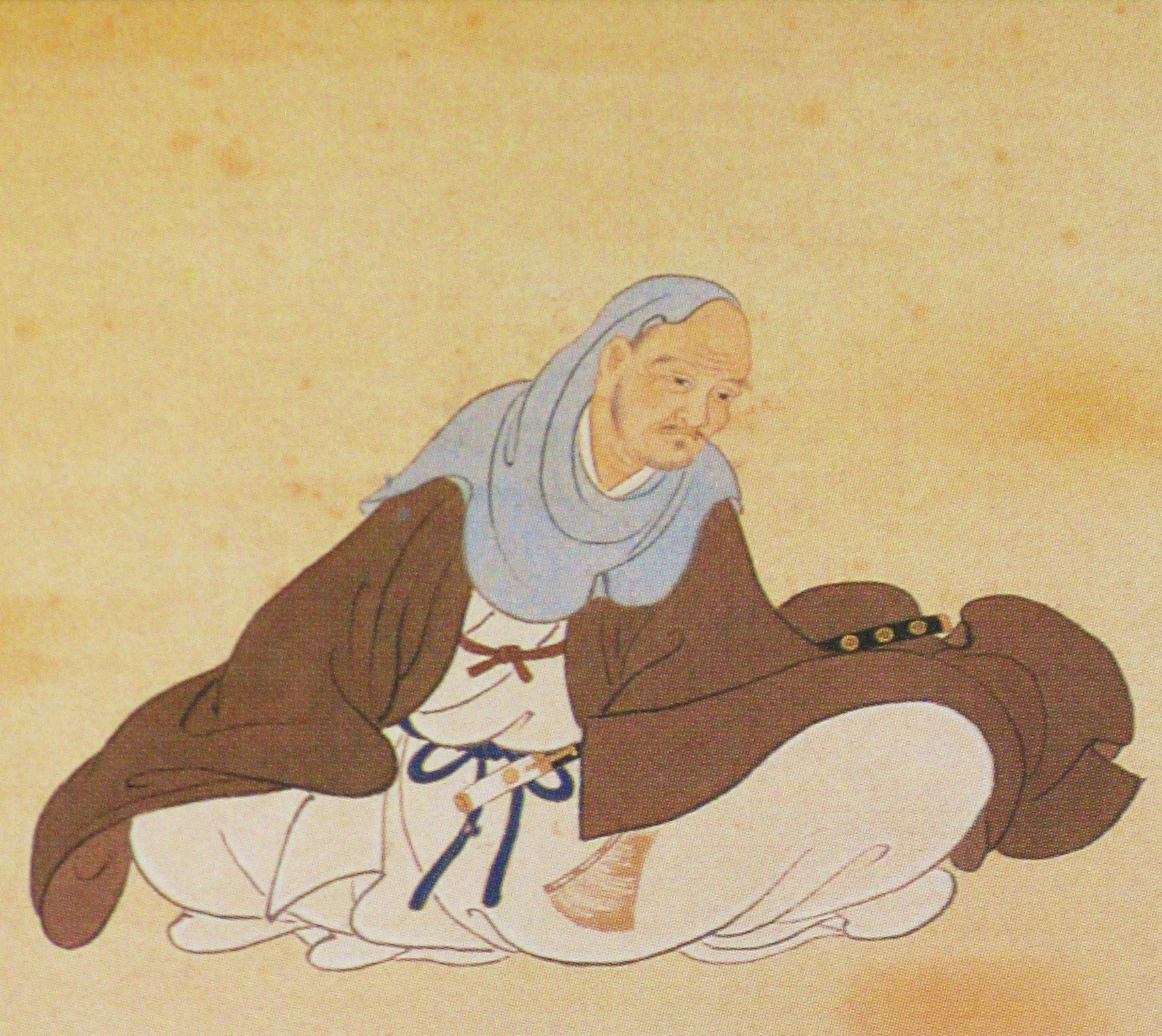 仙台市博物館所蔵の伊達晴宗肖像。